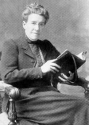 Afkomstig van [1], alwaar te lezen valt dat de afbeelding is gemaakt door het bedrijf Stuarts in Richmond in 1925.